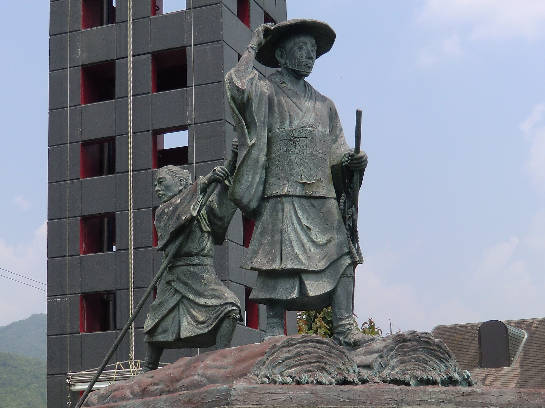 材木運搬の陣頭指揮を執る重源上人の像（山口市徳地）